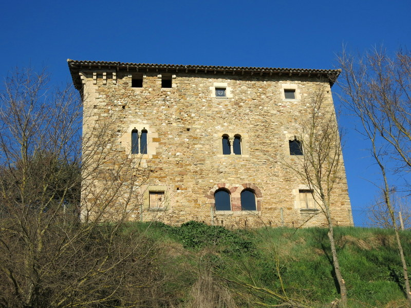 castell de Mont-rodon